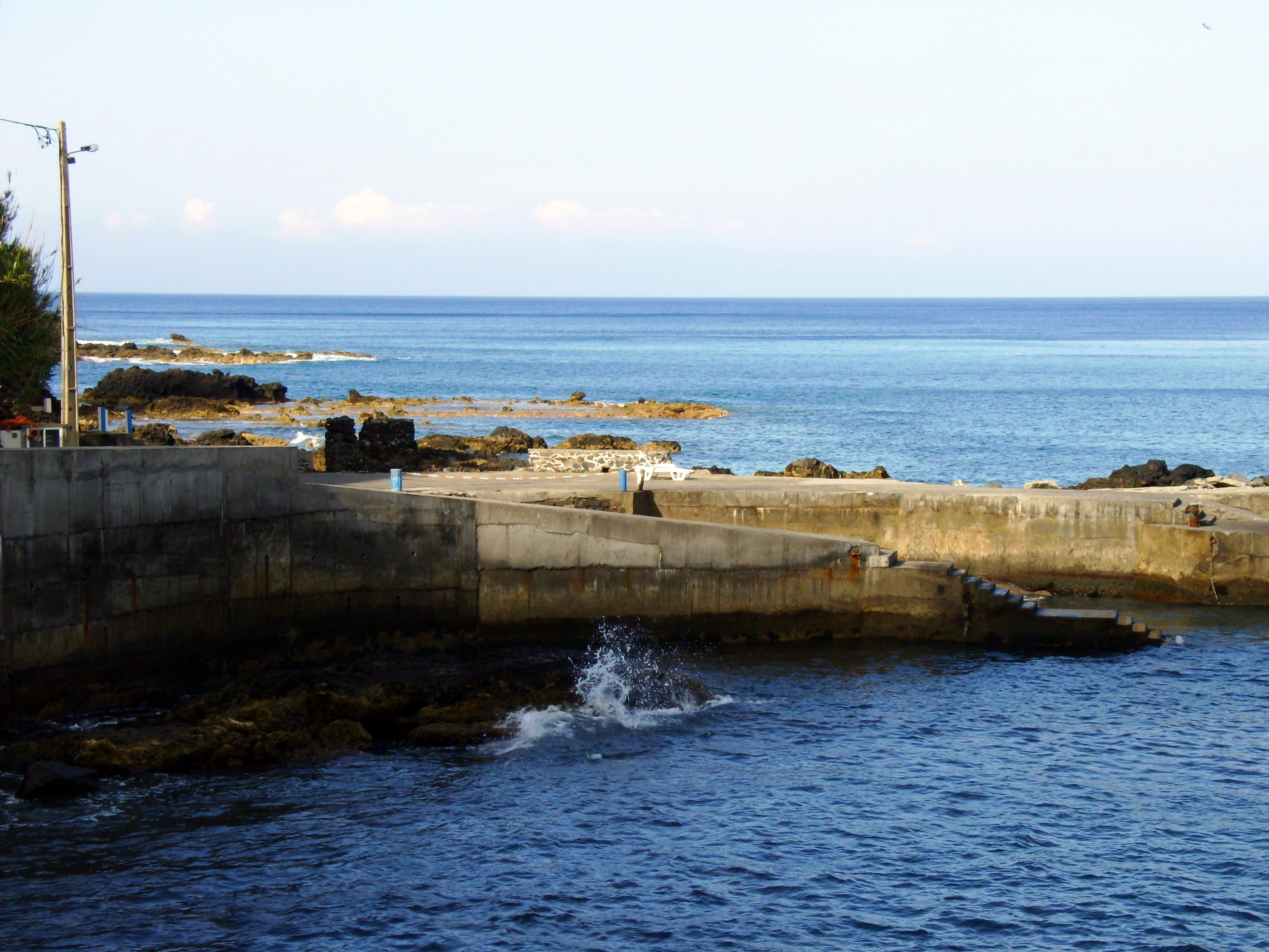 Forte da baía de São Lourenço, Ilha de Santa Maria, Açores: vista panorâmica do remanescente.